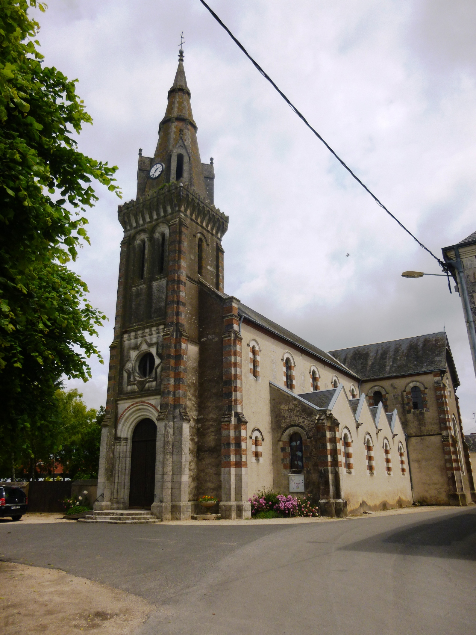 Eglise de Josnes